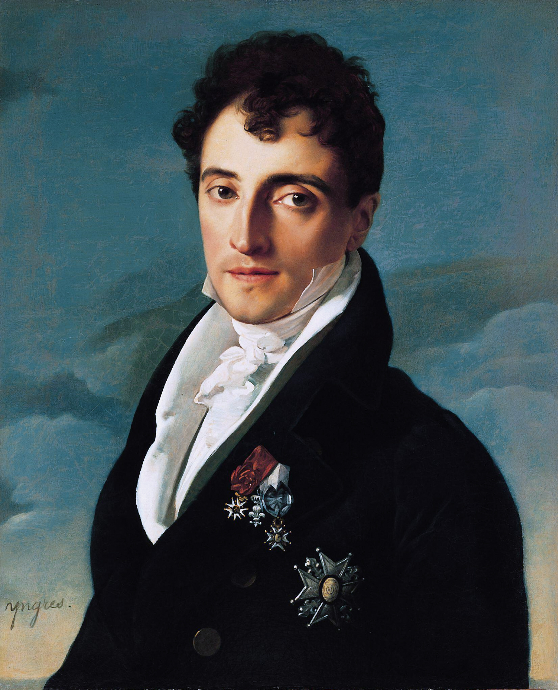 Ingres - Baron Joseph-Pierre Vialetès de Mortarieu. Huile sur toile, 61,2 x 50,2 cm, Pasadena (Ca, USA), Norton Simon Museum, F.1983.03.P